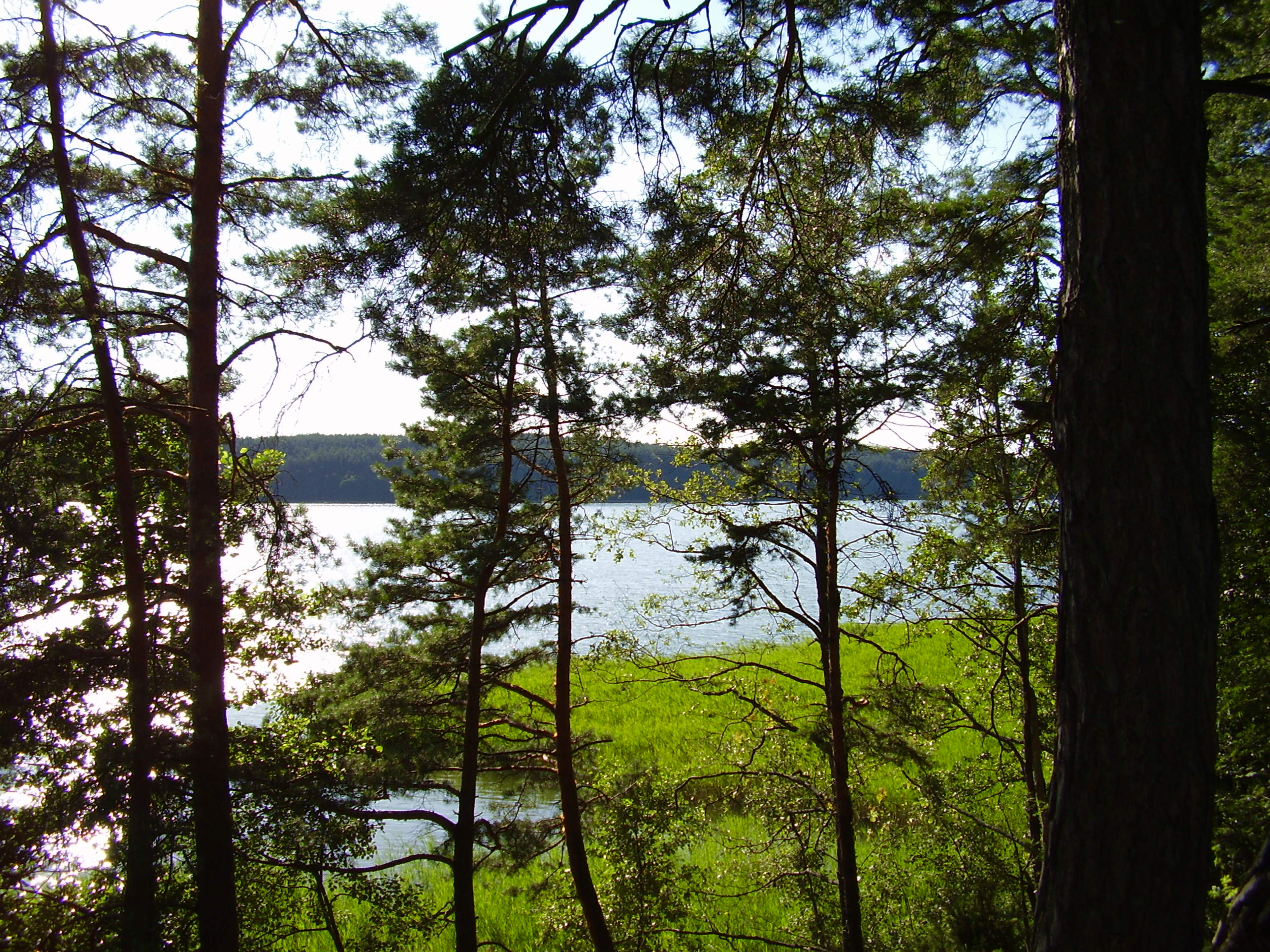 Lake Kosno, Jezioro Kośno k. Olsztyna